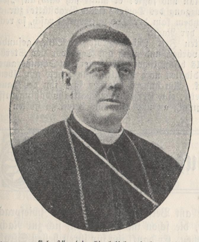 Erzbischof Carlo Caputo, Apostolischer Nuntius in Bayern, 1904-1907